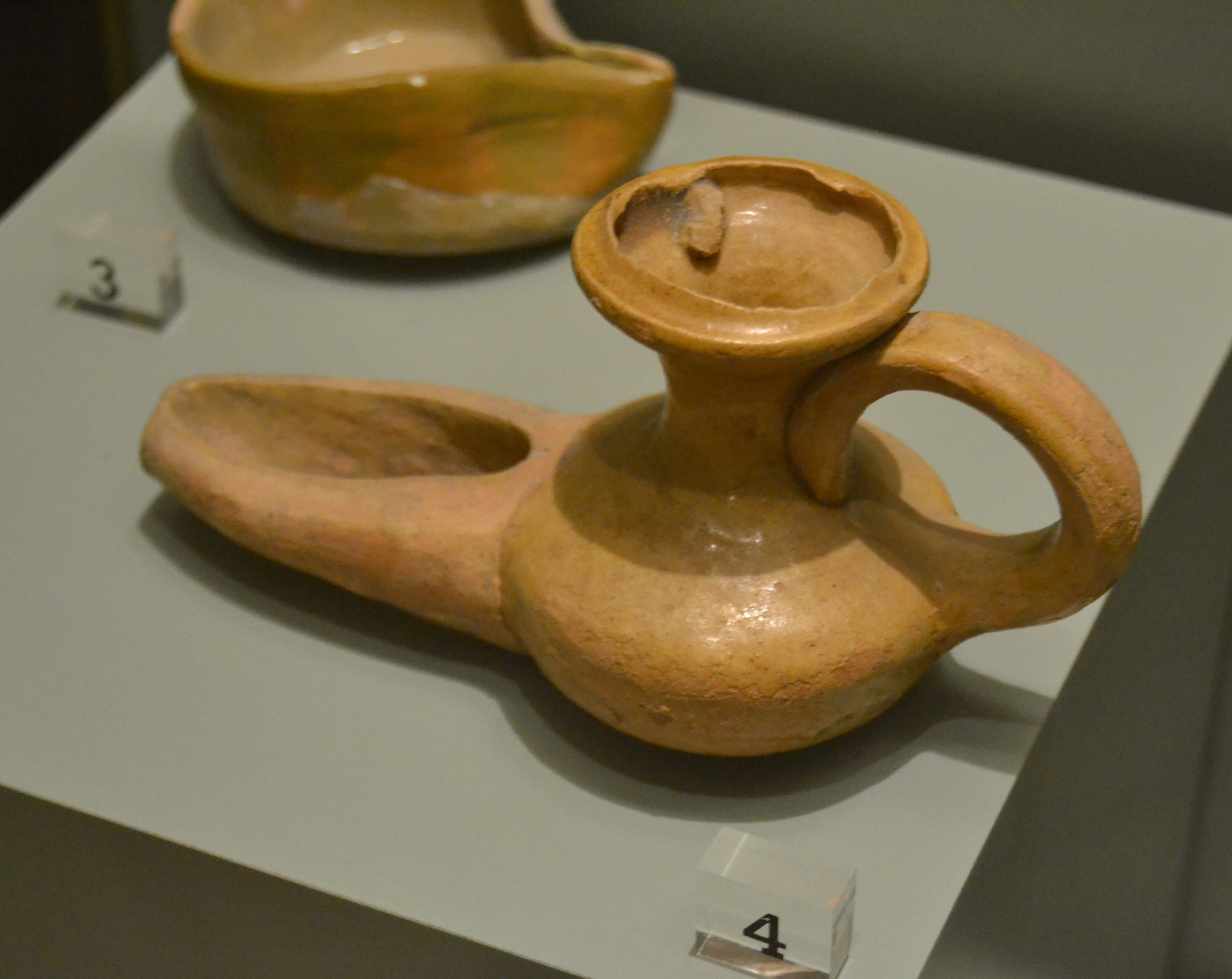 Cresol, segle XI, dipòsit de l'ajuntament de Benetússer, museu Nacional de Ceràmica de València.